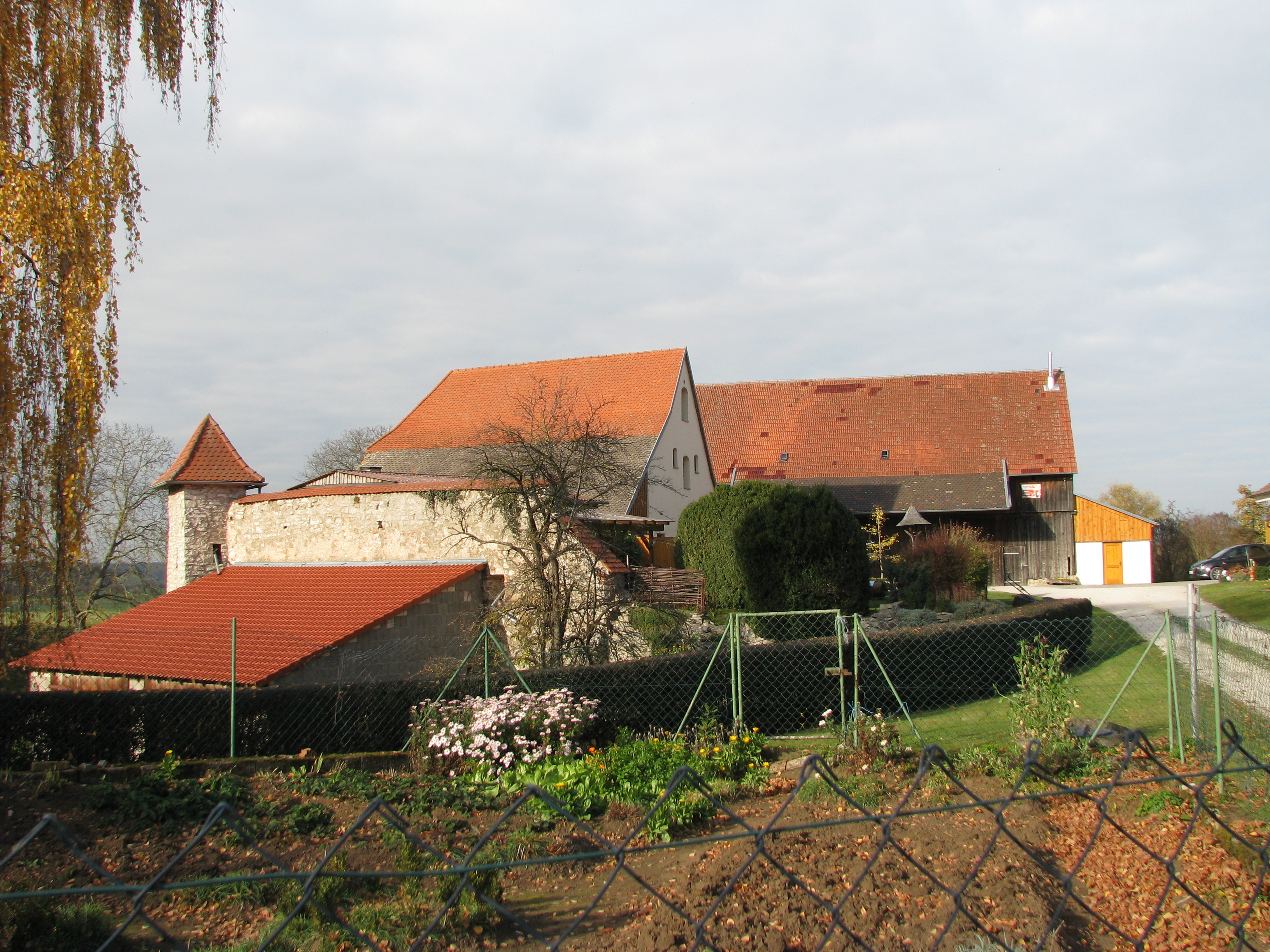 Jettenhofen, Ortsteil von Freystadt im Landkreis Neumarkt in der Oberpfalz, Beringreste am ehemaligen Schloss